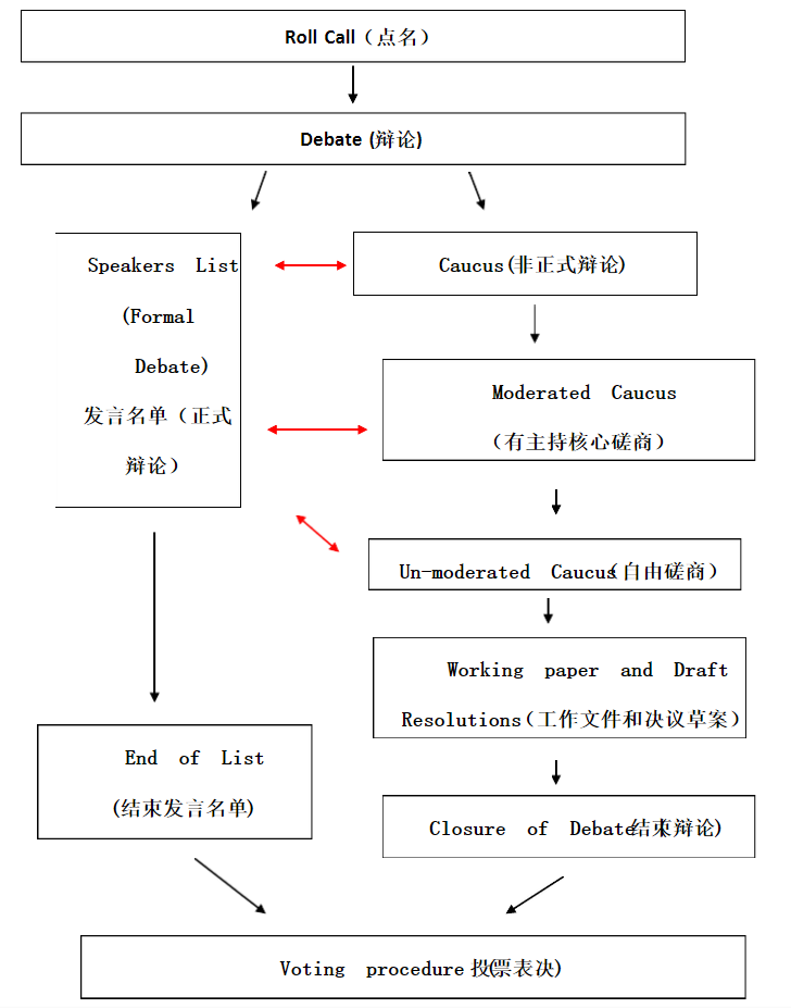 模拟联合国会议流程